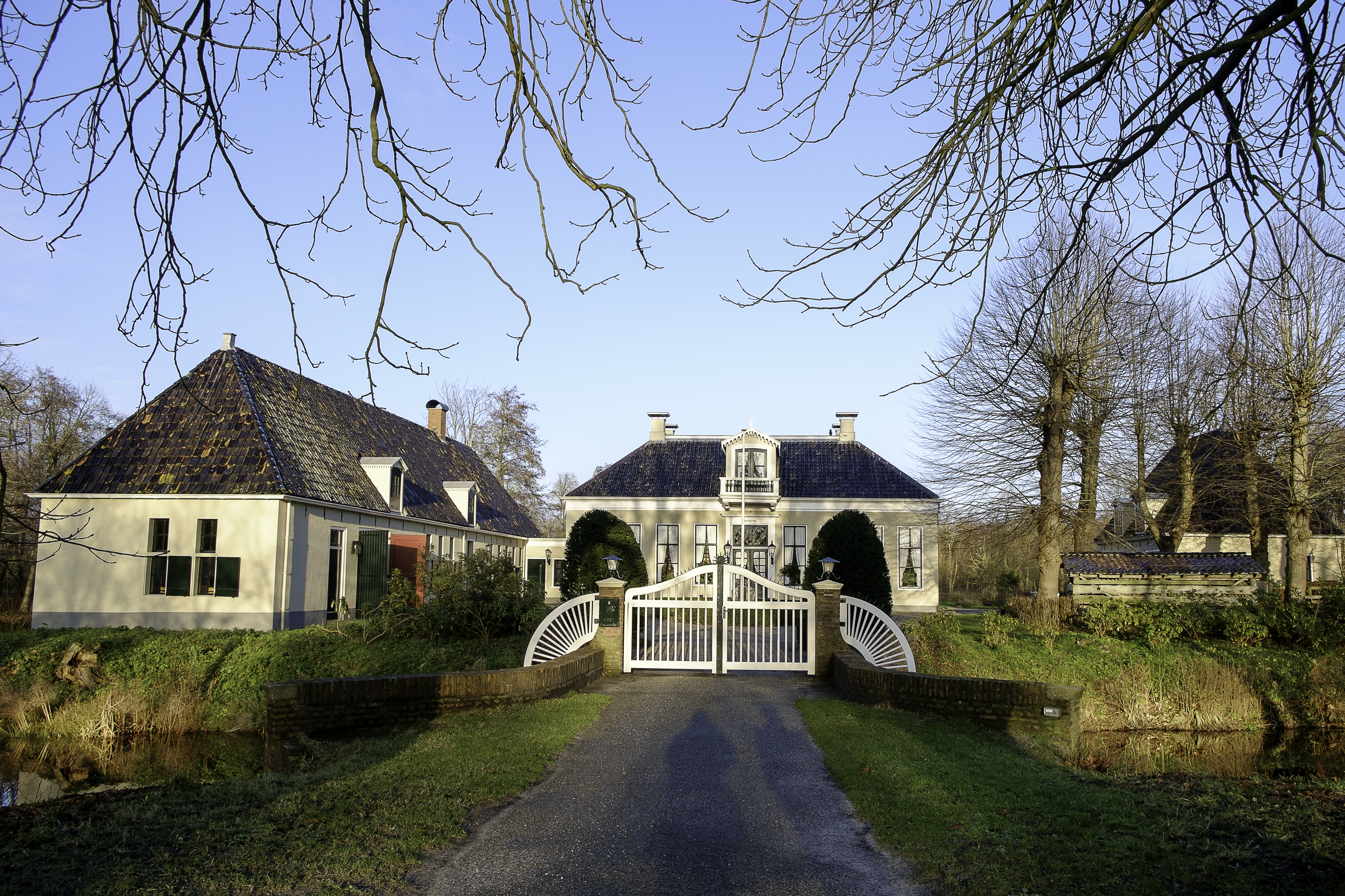 Rensumaborg